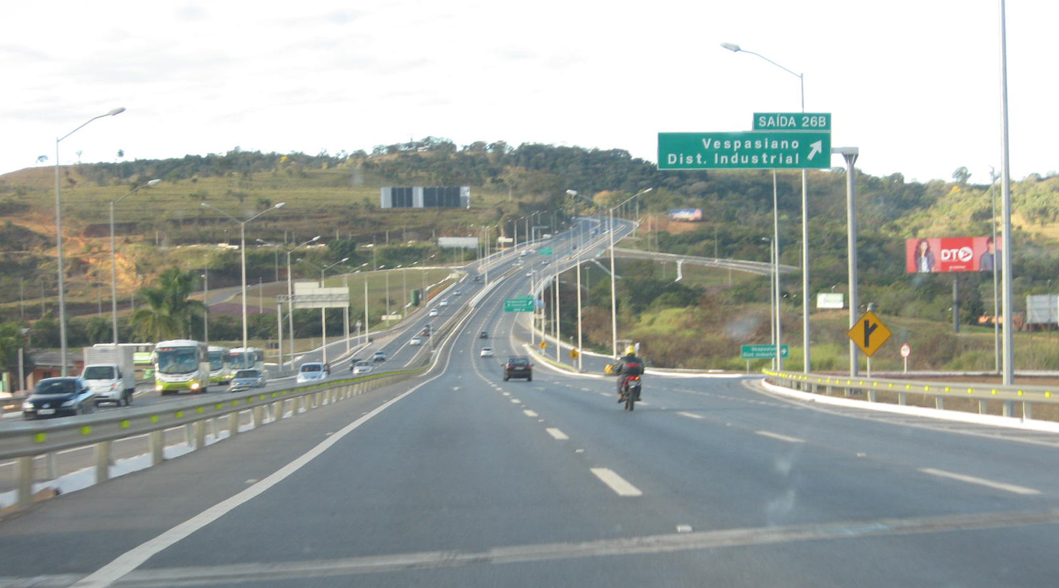 Vista da Linha Verde, em Belo Horizonte, Minas Gerais.